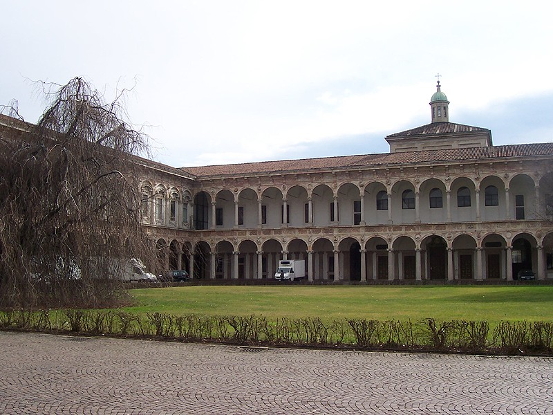 Milano - Cortile della Cà Granda (Università Statale)